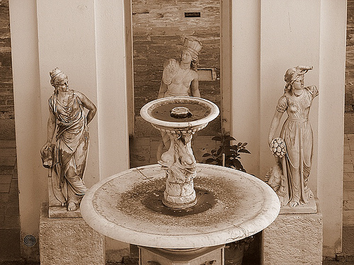 Fuente en la entrada del antiguo Cabildo de Montevideo, Uruguay.